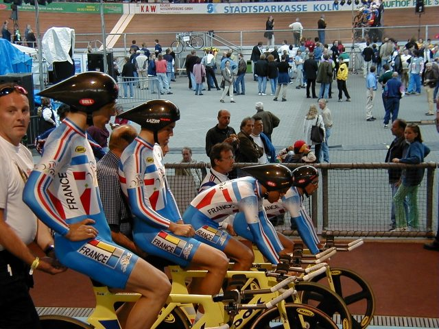 Start zur Mannschaftsverfolgung, französisches Team, Albert-Richter-Radstadion Köln